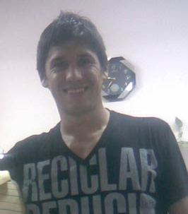 El jugador uruguayense nicolás torres.